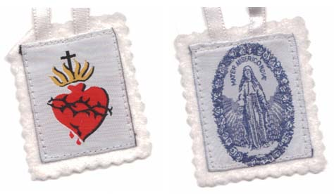 Szkaplerz Najświętszego Serca Jezusa, związany z objawieniami Najświętszej Maryi Panny w Pellevoisin w 1876 roku dla Estelli Faguette.